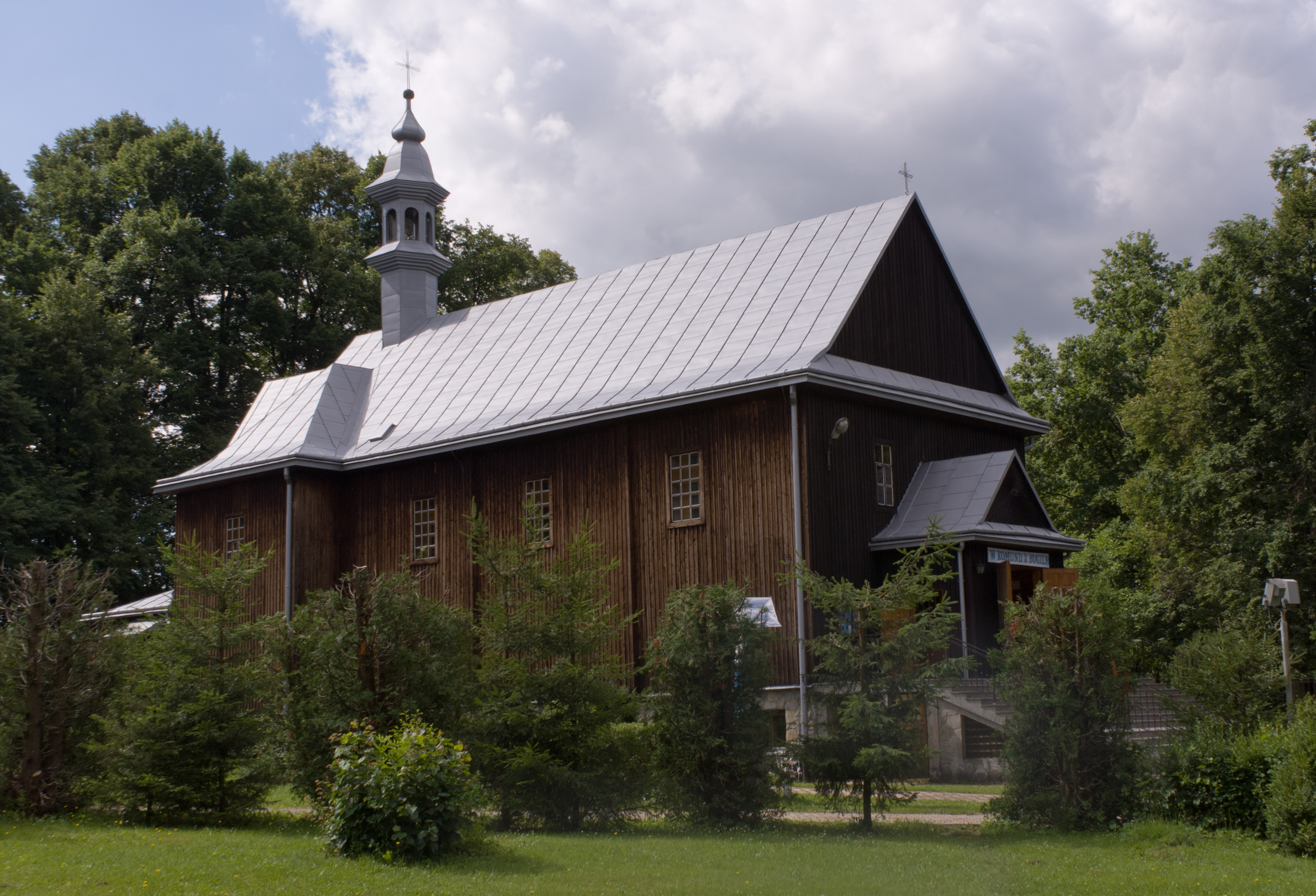 Kościół pw Św. Trójcy w Zmiennicy.